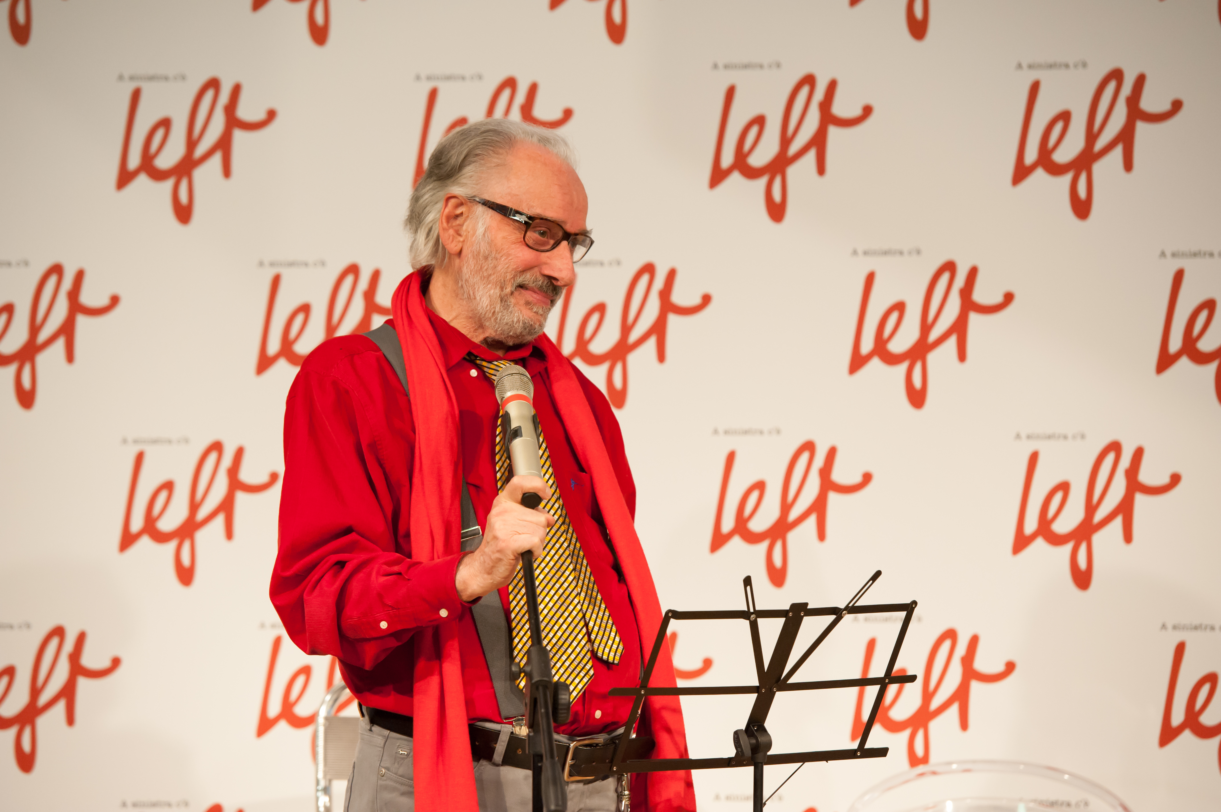 Massimo Fagioli alla Festa del settimanale Left del 26 ottobre 2014, tenutasi a Roma presso il Complesso ex cartiera Latina